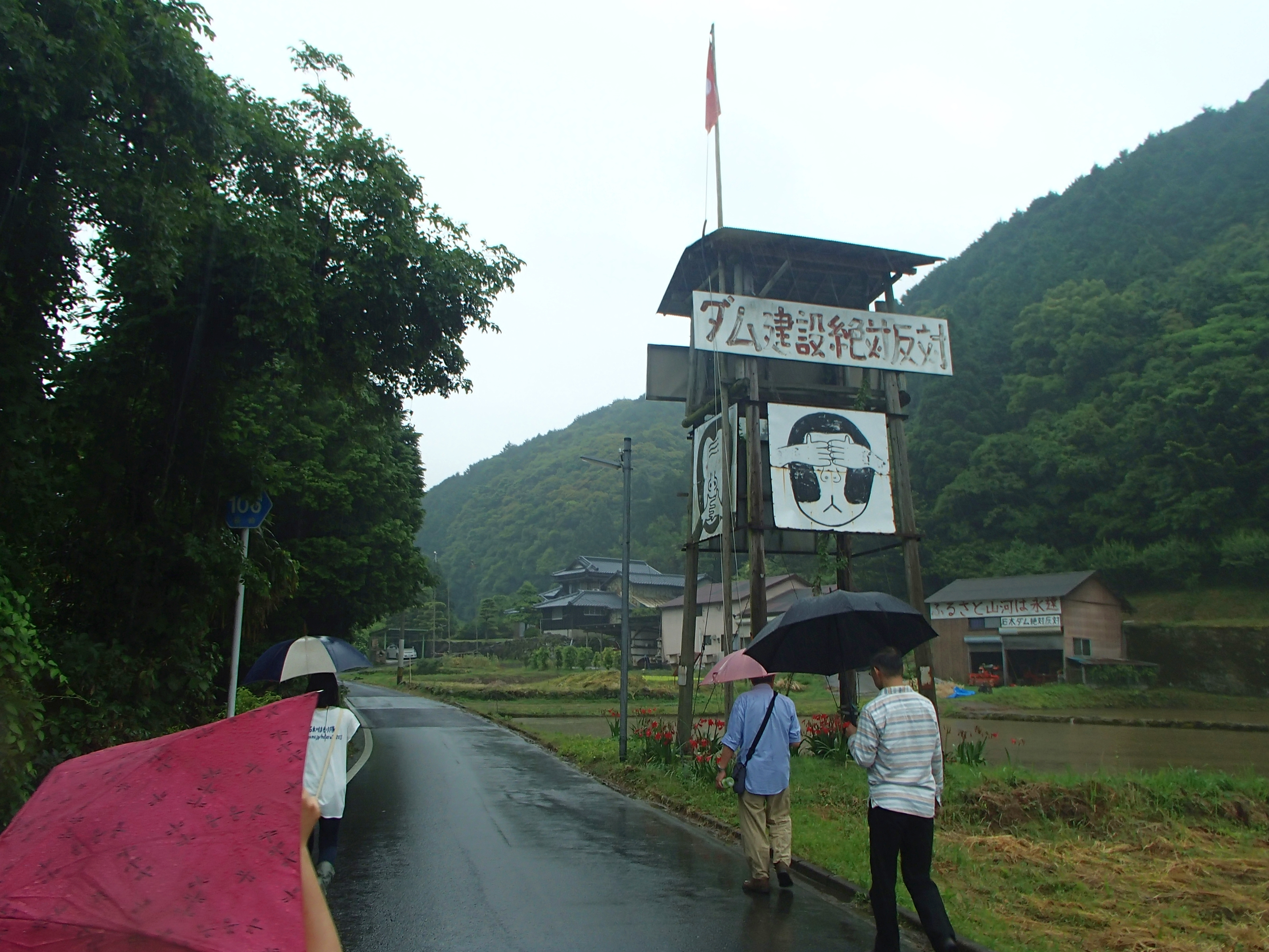 川原